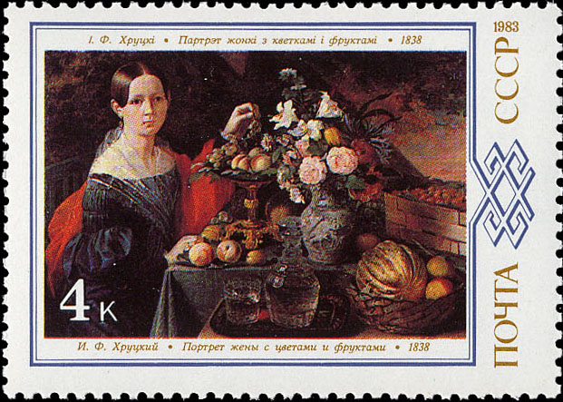 Беларуская (тарашкевіца): Паштовая марка СССР 1983 году. Іван Хруцкі «Партрэт жонкі з кветкамі і садавінай» (1838)